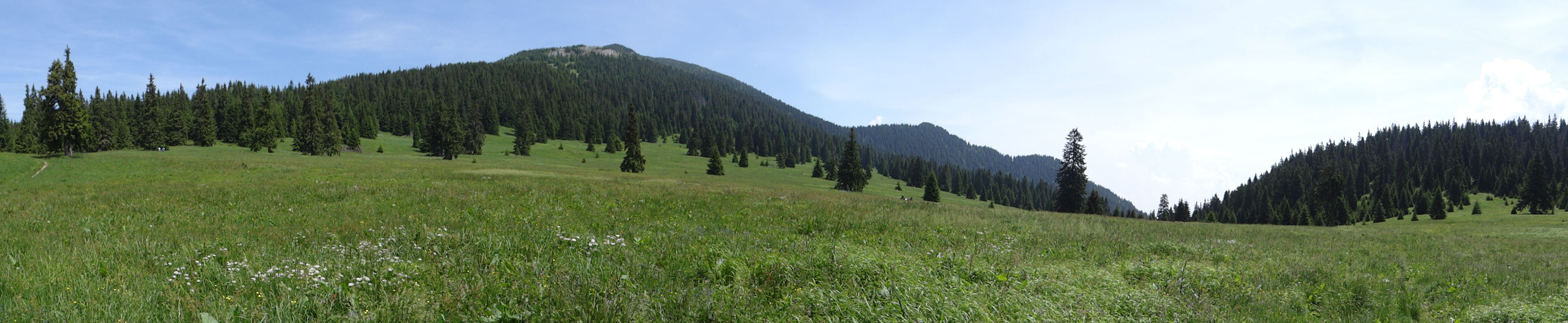 Stredná poľana (Pośrednia Polana). Panorama